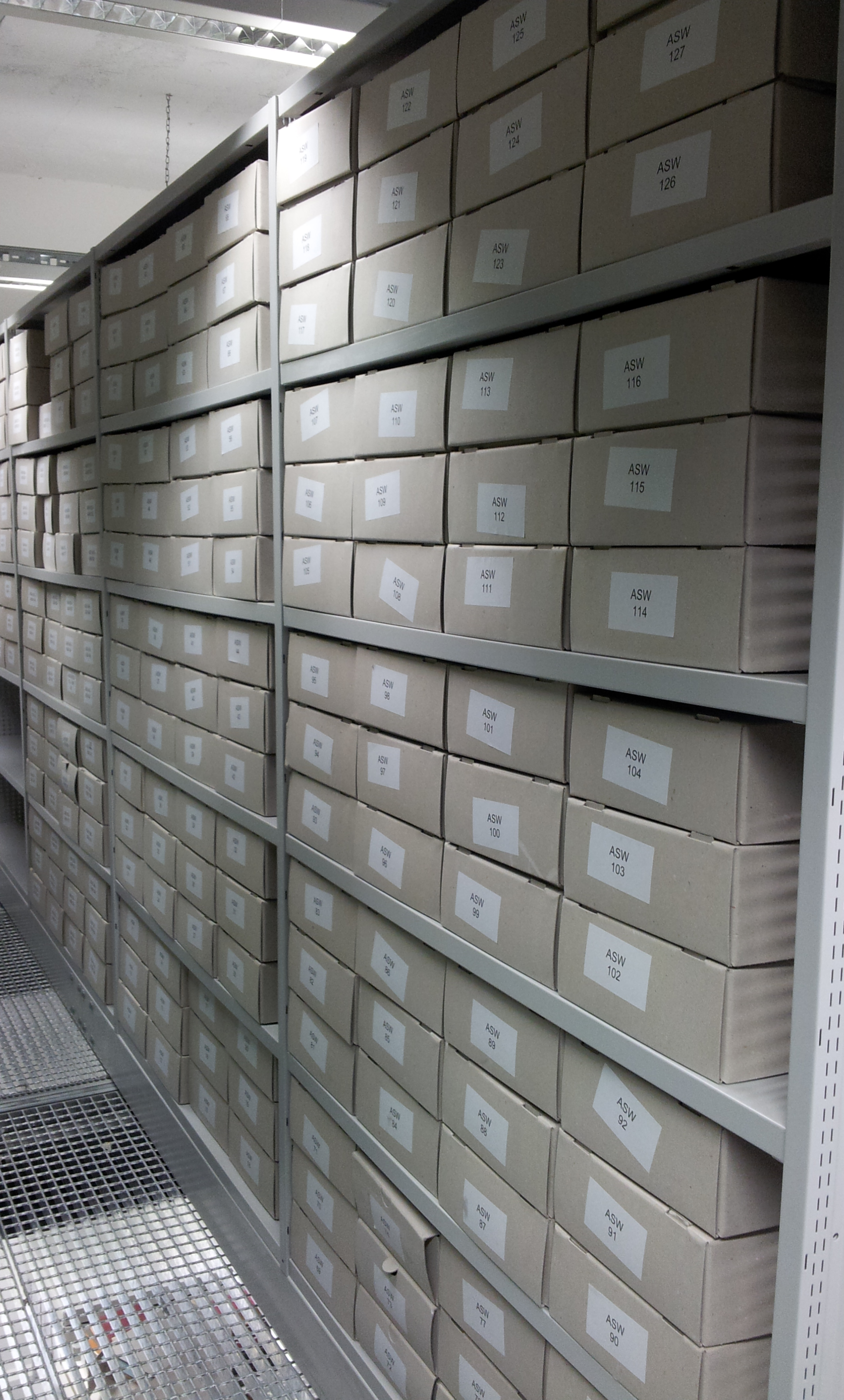 mehrere Archivkartons in Regal